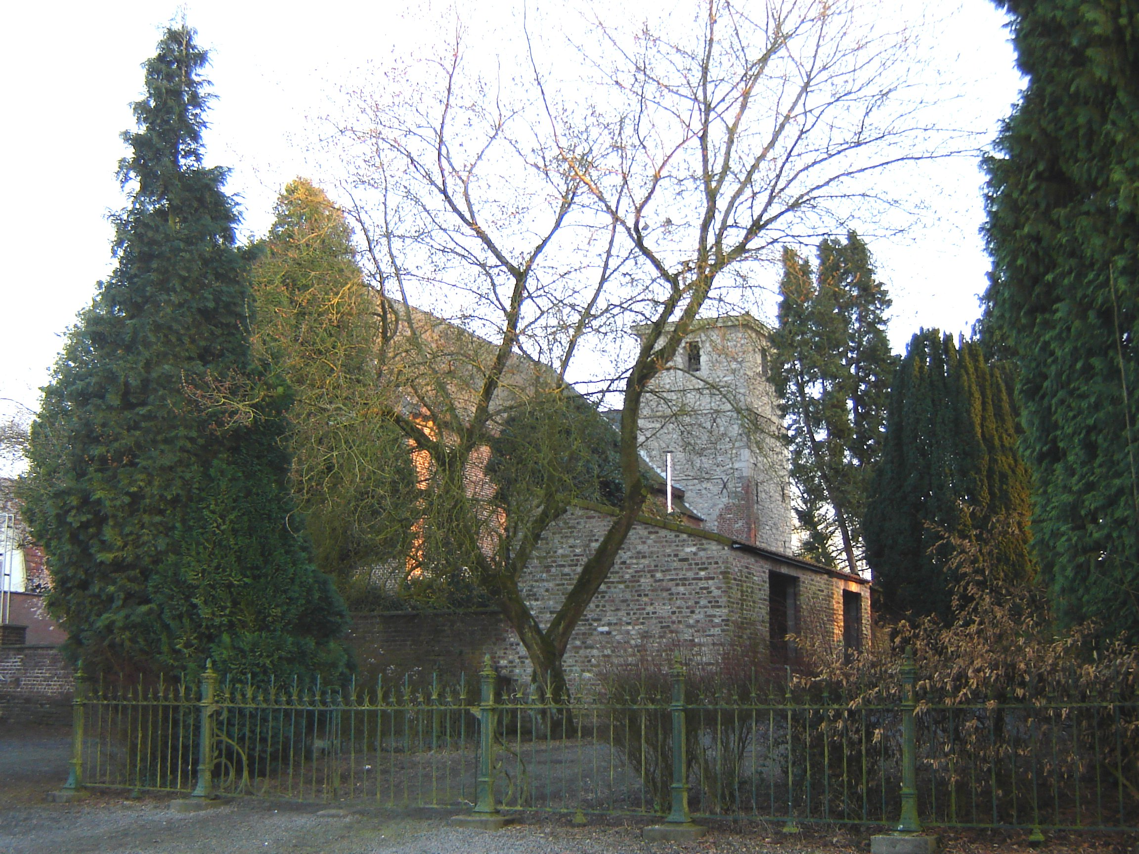 Eglise Saint-Amand in Lamain, Tournai, Hainaut, Belgium